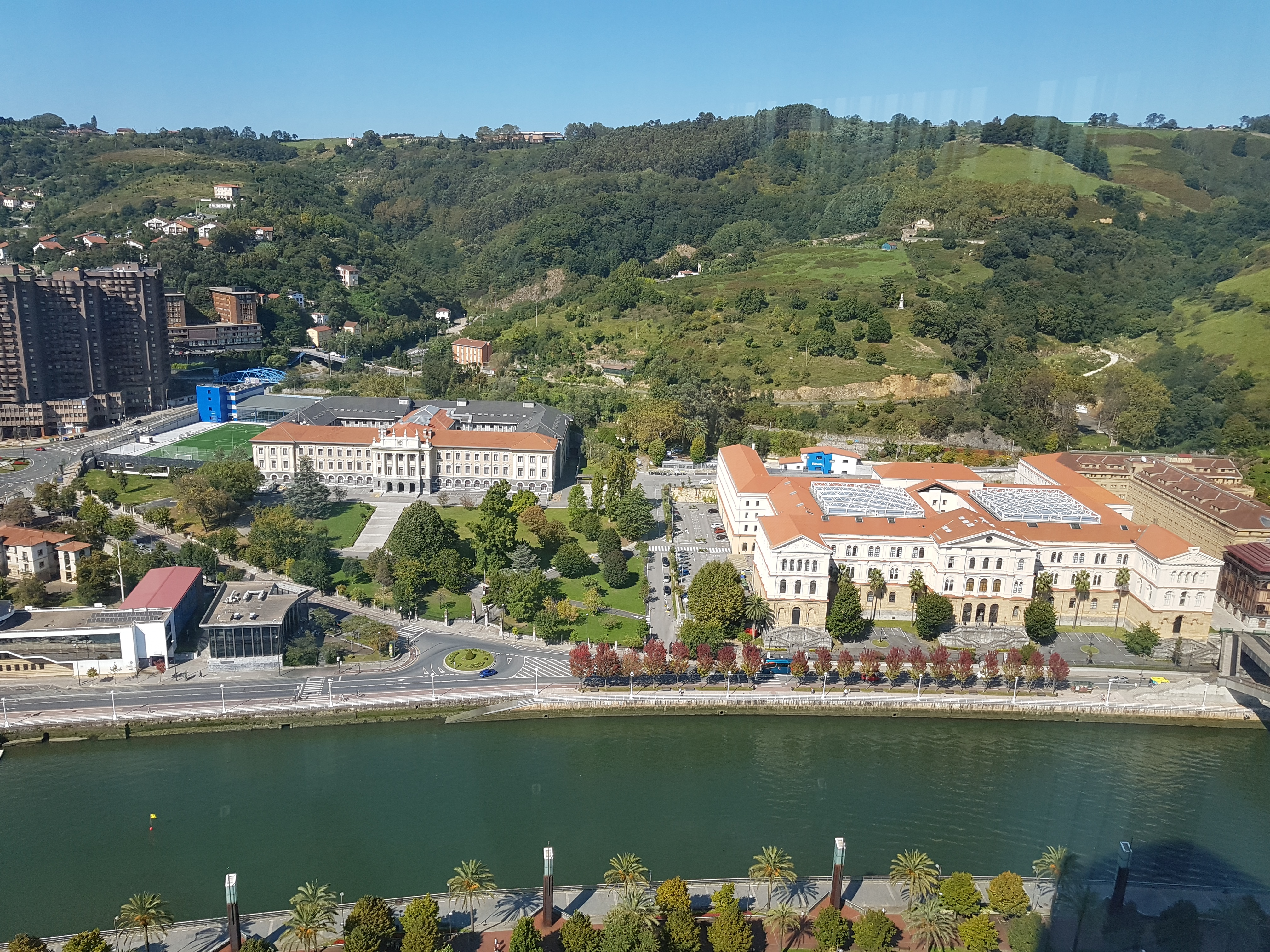 Abandoibarra.